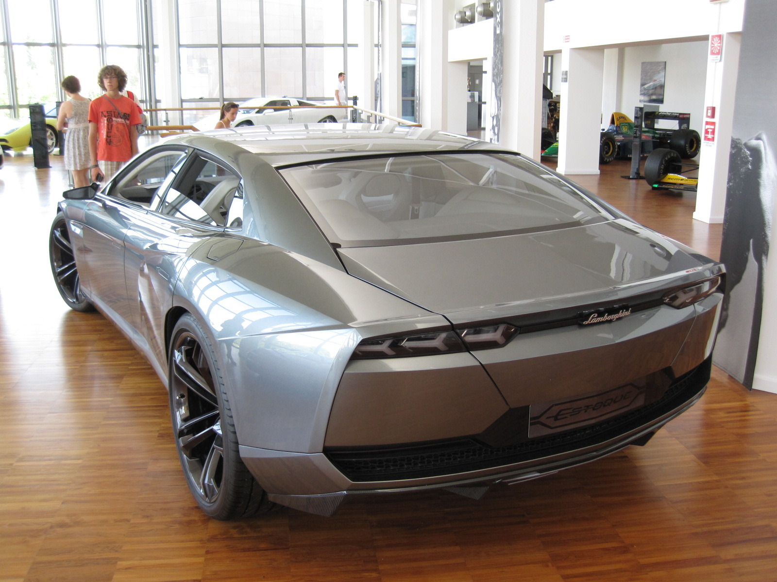 Musée Lamborghini - Estoque